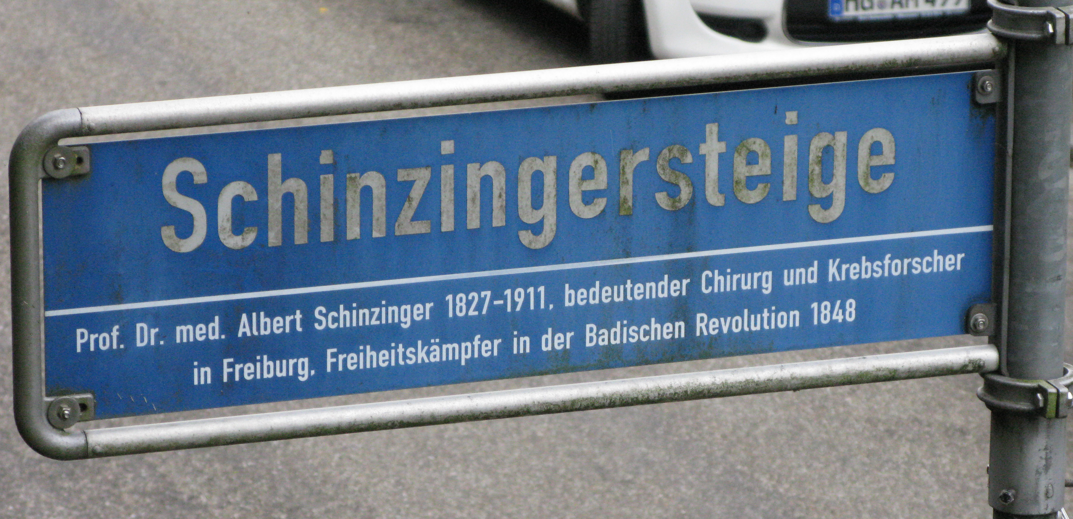 Schinzingersteige auf der Grenze zwischen Freiburg-Neuburg und -Herdern